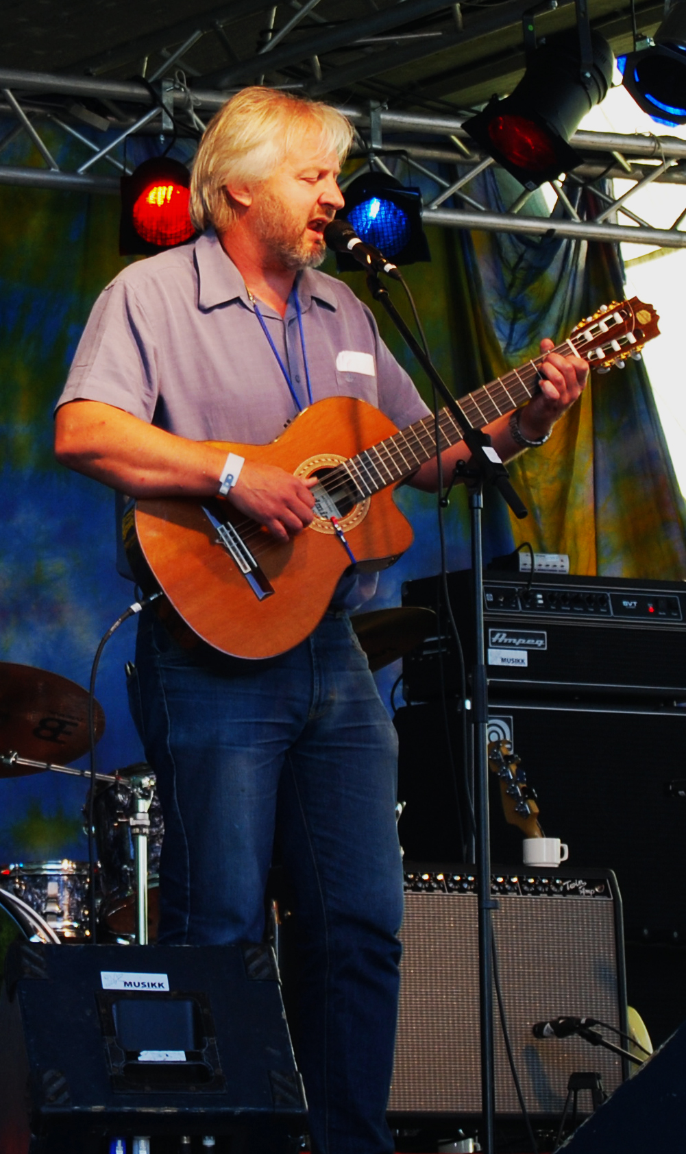 Tor Karseth spiller på Under brua-festivalen i Hamar 18. august 2007.